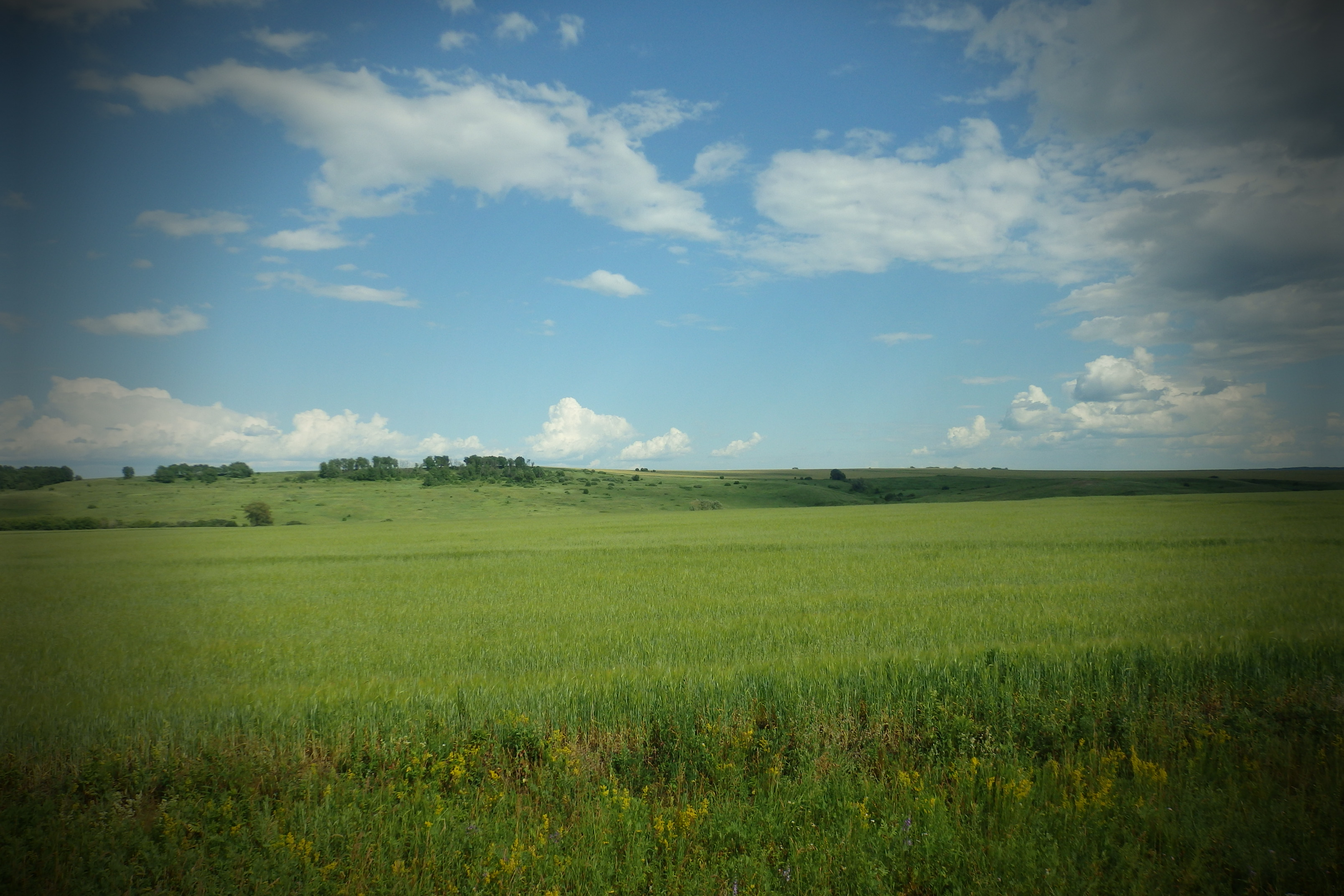 Typowy krajobraz w okolicy Poczinok na połódniu obwodu Niżnonowogrodzkiego. Brak lasów, pola.